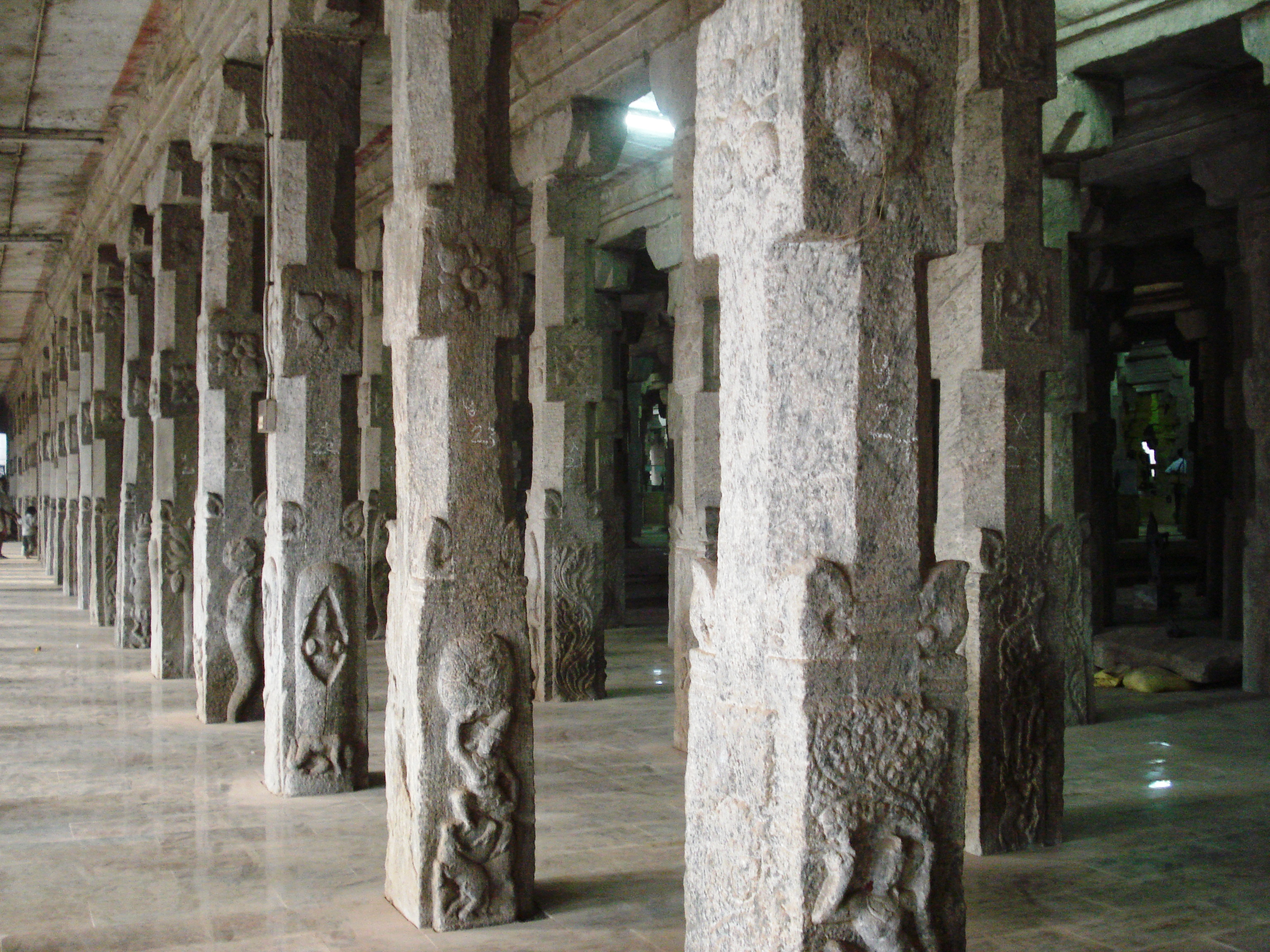 മധുര മീനാക്ഷി ക്ഷേത്രത്തിലെ പ്രസിദ്ധമായ ആയിരം കാൽ മണ്ഡപം